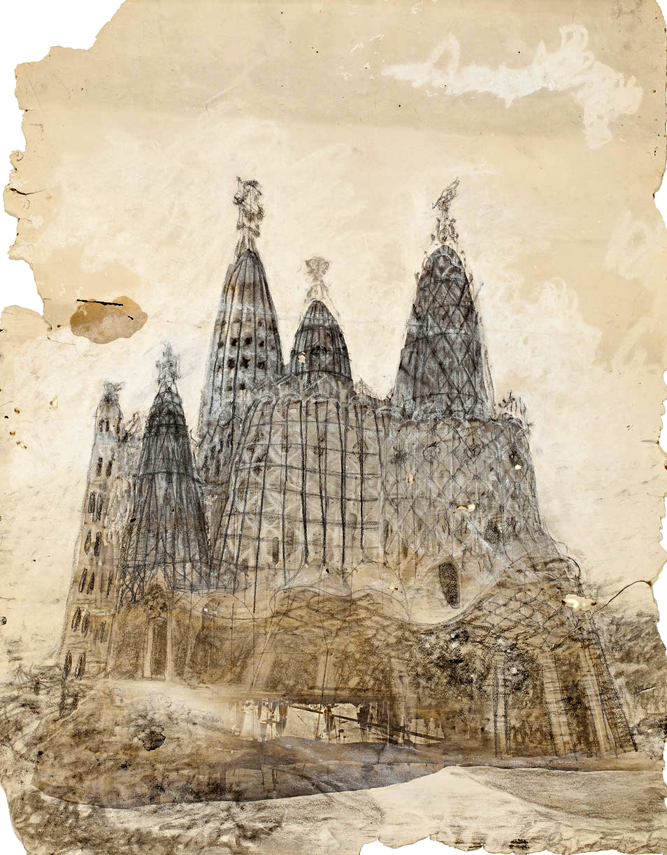 Antonio Gaudí: Dibujo del exterior de iglesia de la Colonia Güell